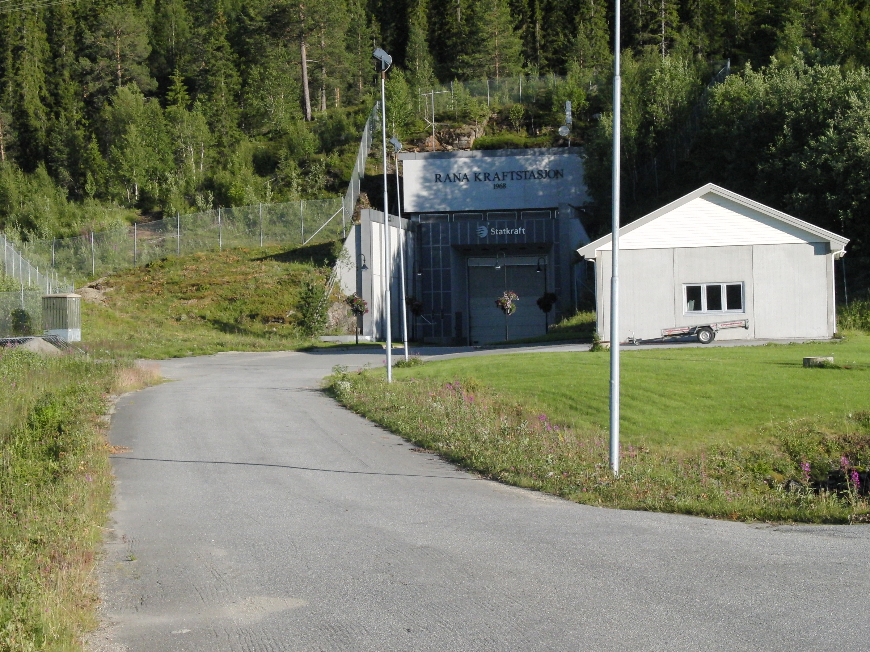 Rana kraftverk